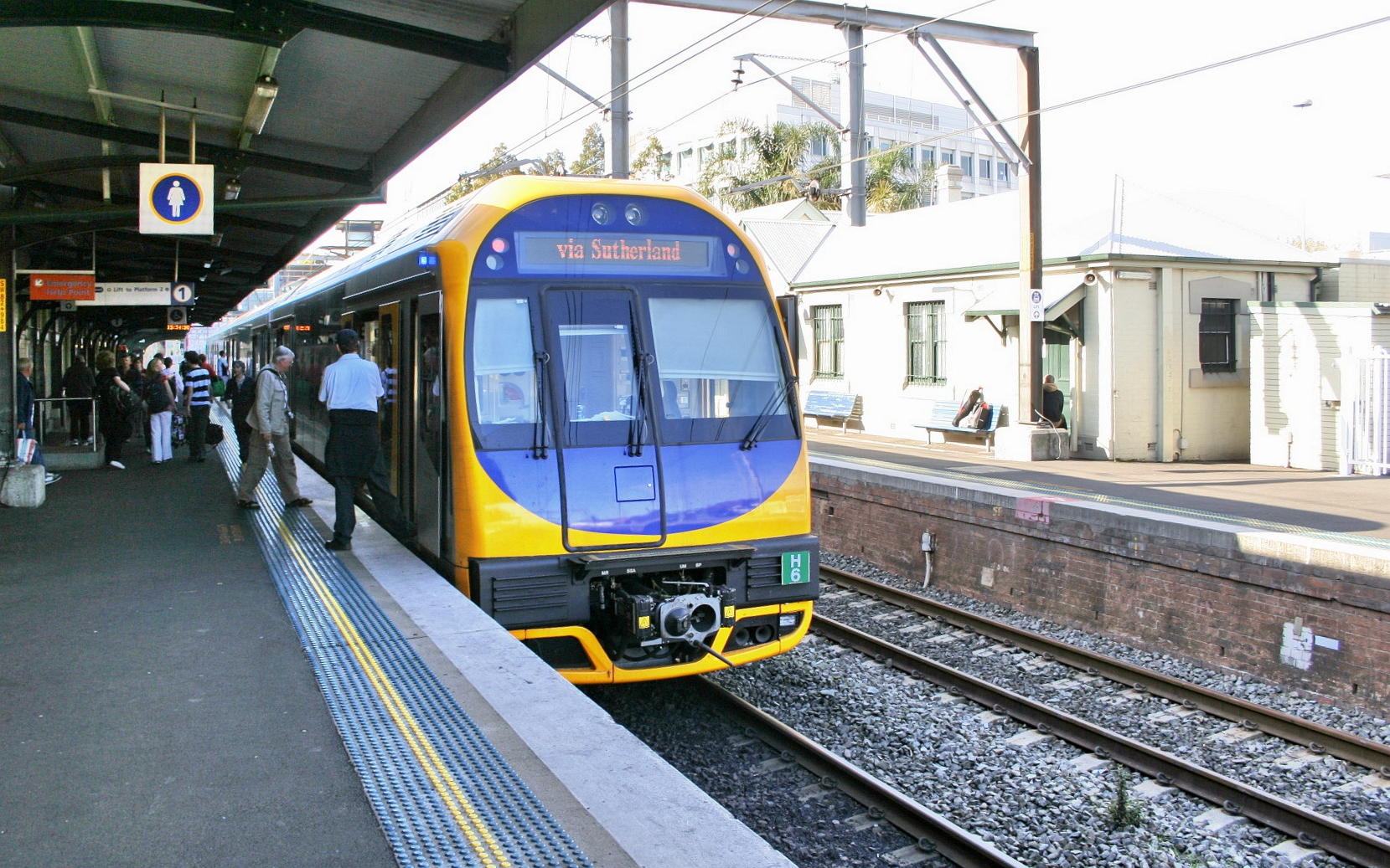 Wollongong station